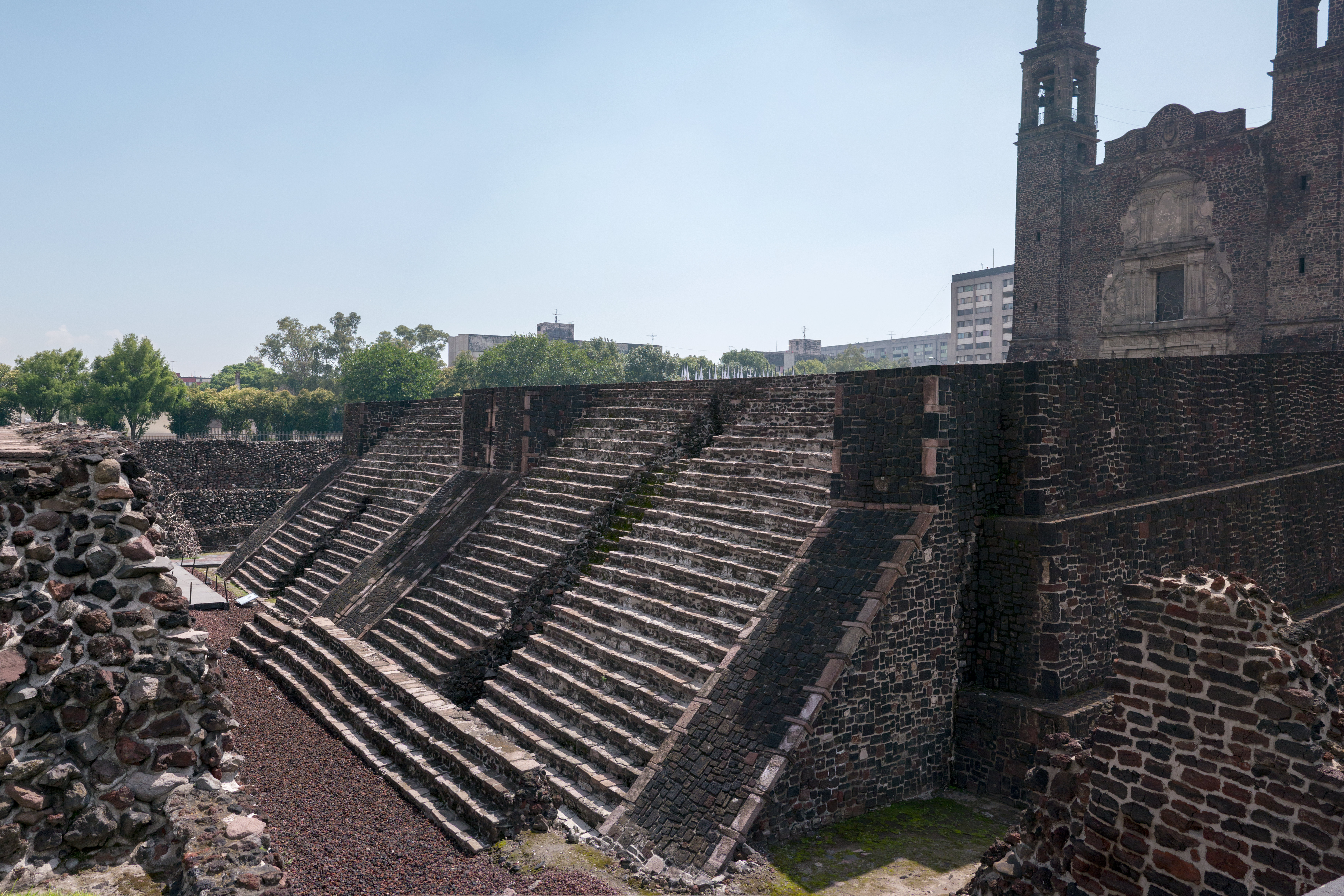 Tlatelolco Main Temple